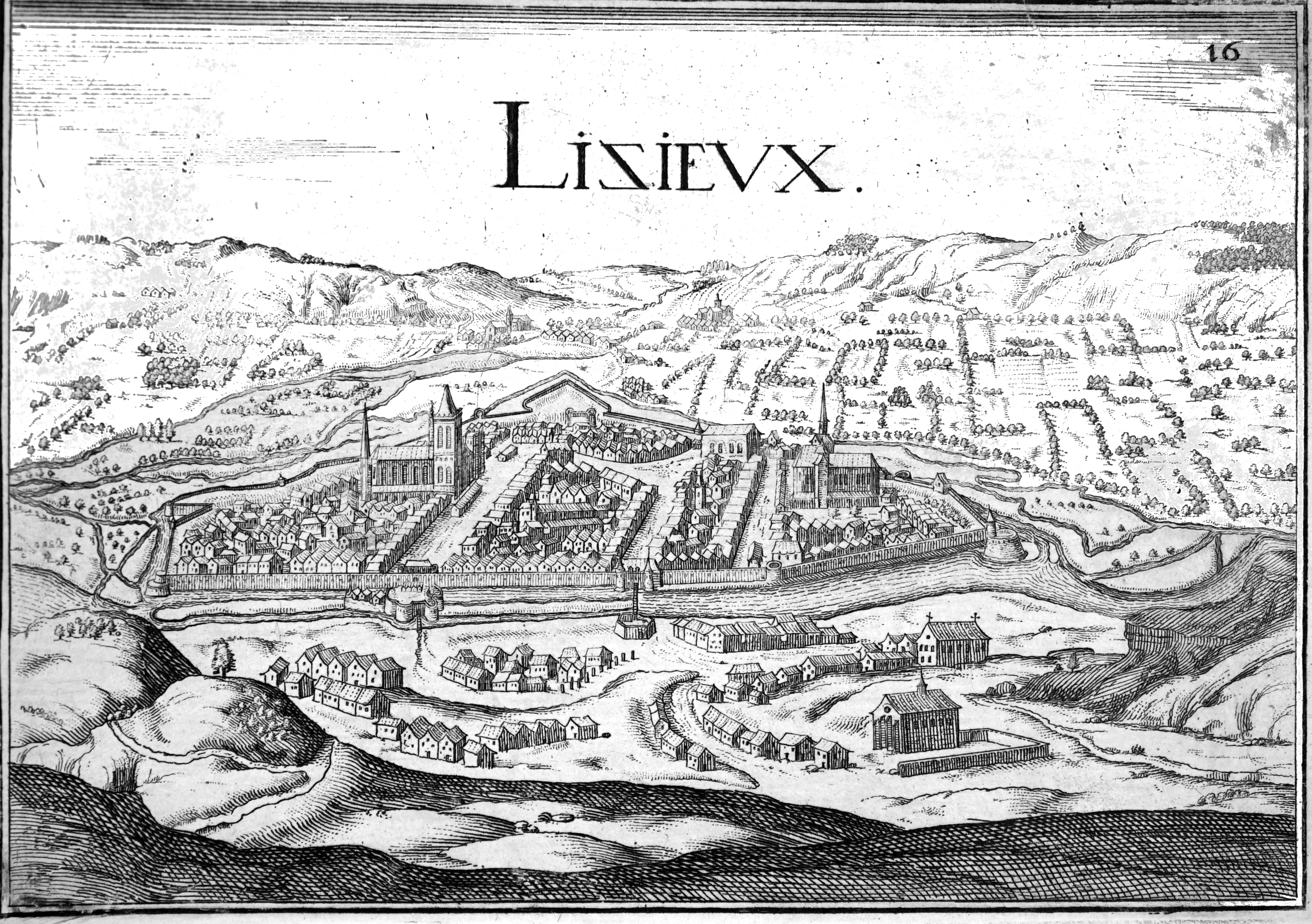 dessin de Tassin dans Plans et profils...'.